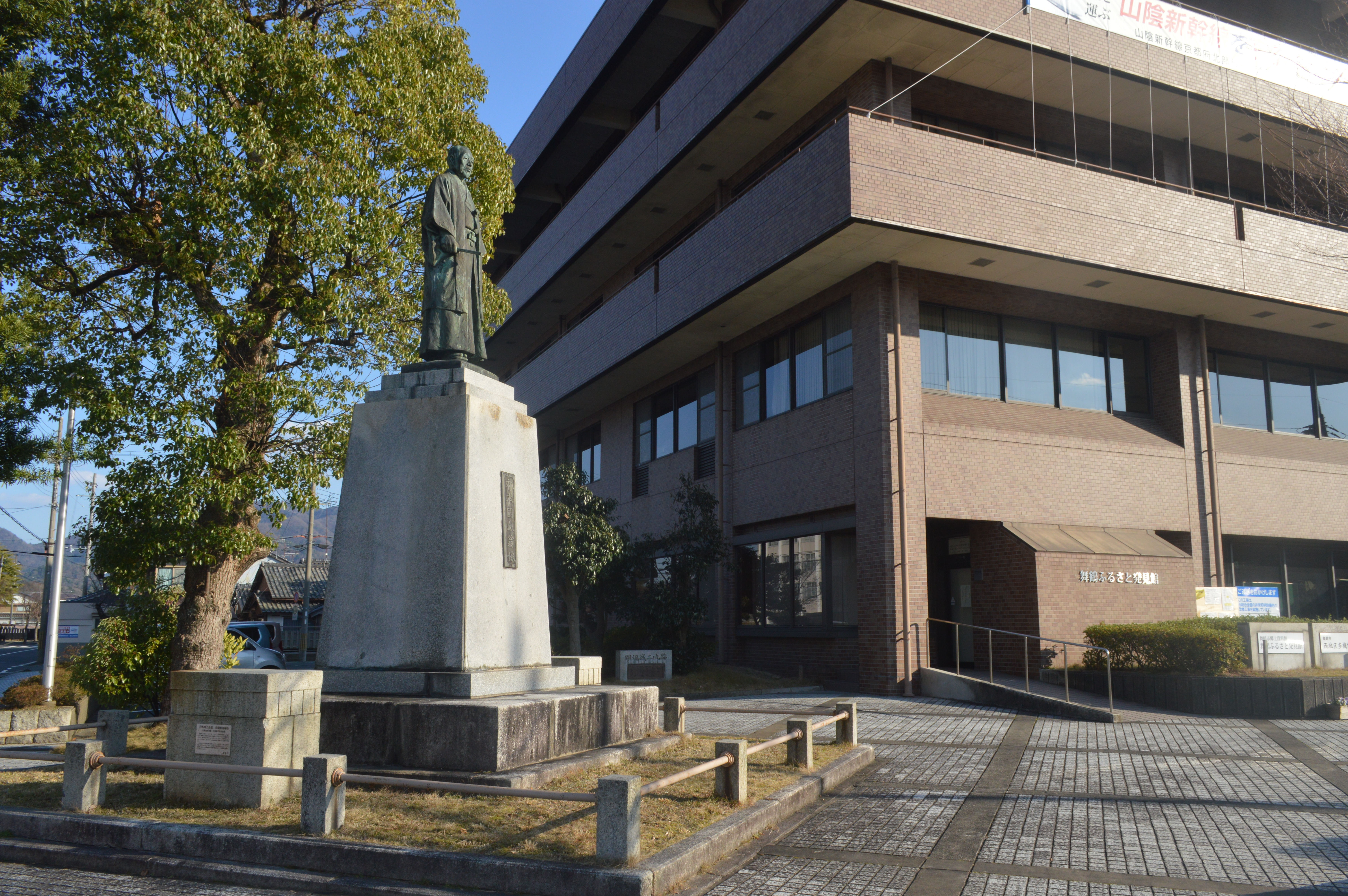 京都府舞鶴市の舞鶴西総合会館（右）と有本国蔵の銅像。